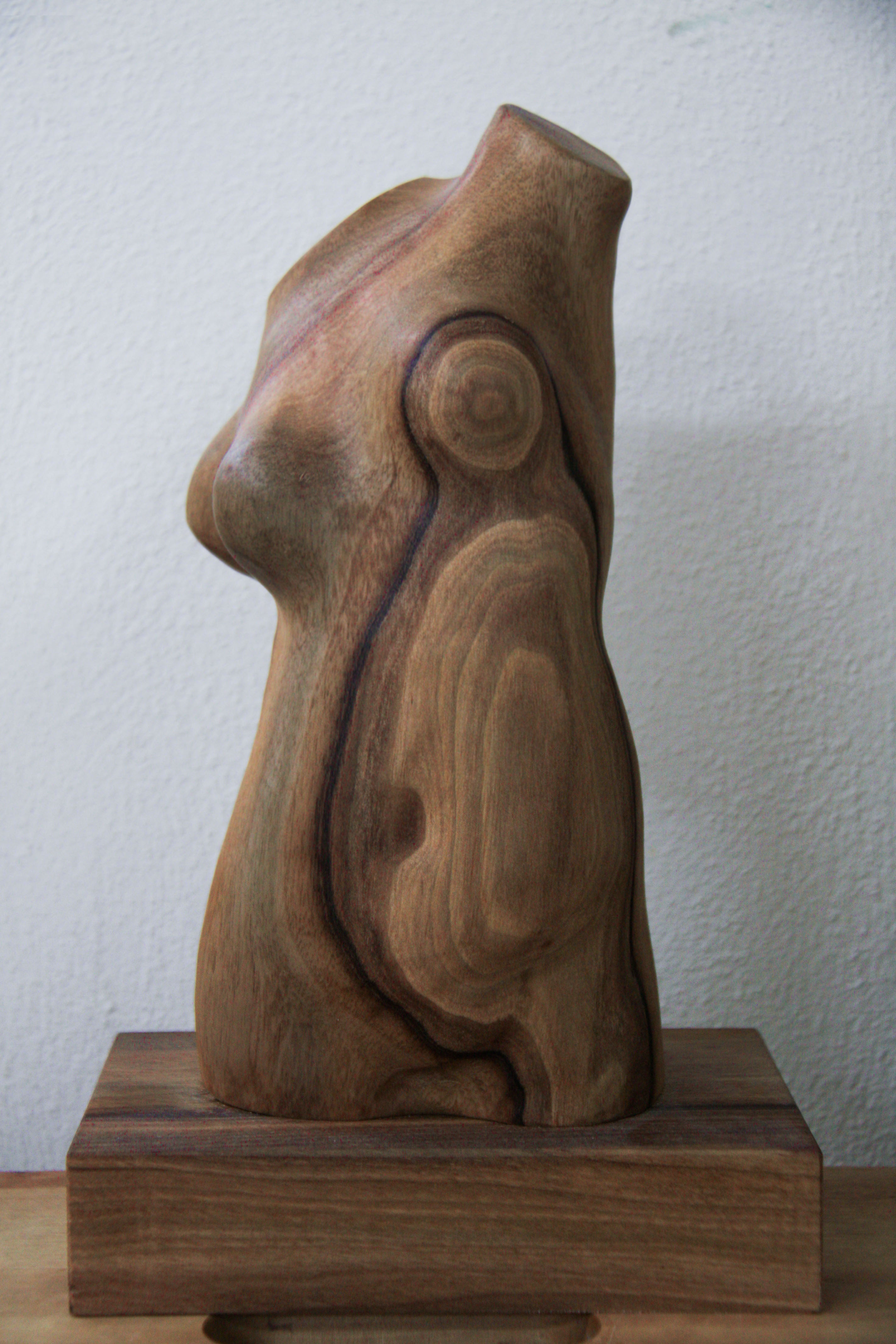 Ludowy akt o greckich proporcjach wg autora na wzór Wenus z Milo. Autorstwo: rzeźbiarz Jan Brlica (młodszy). Wykonane z orzechu